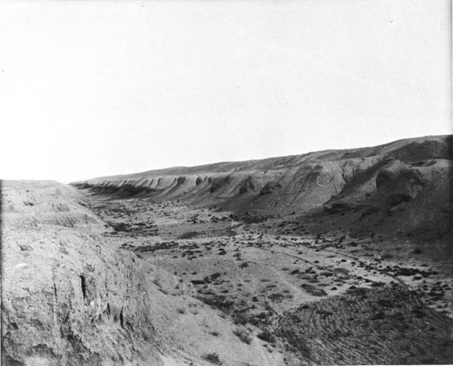 Nahrawan-Canal Trockenbett Samarra - Irak